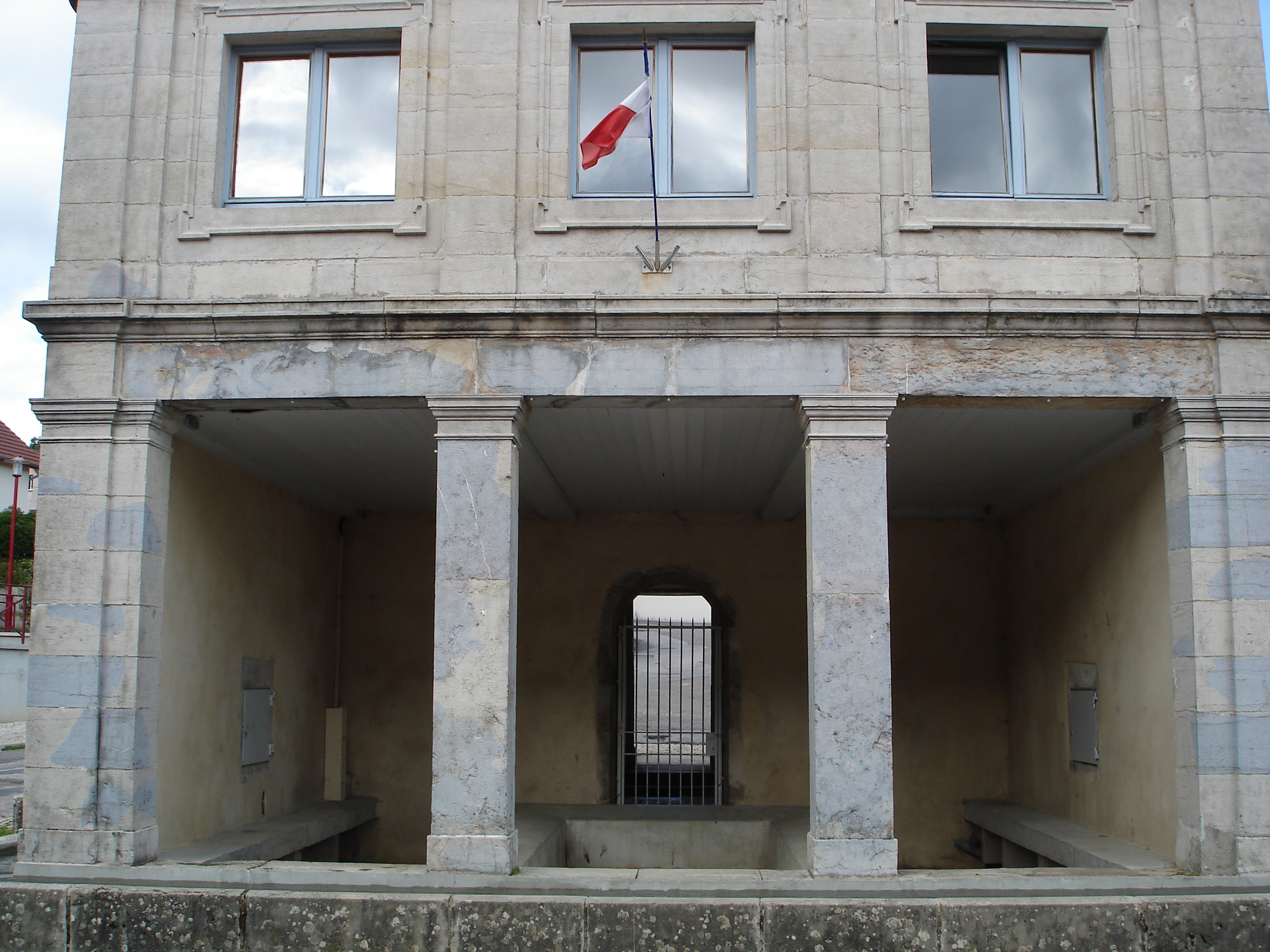 Le lavoir .